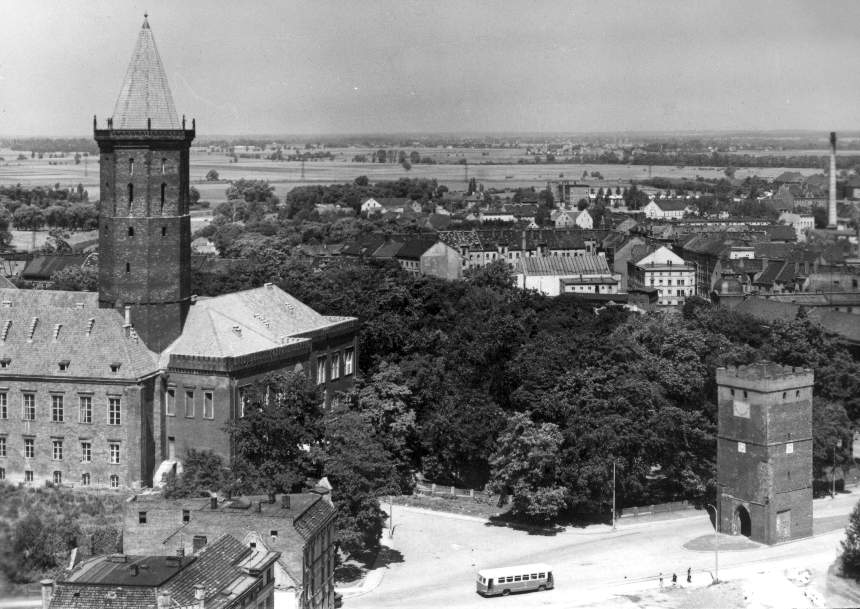 Castle in Legnica